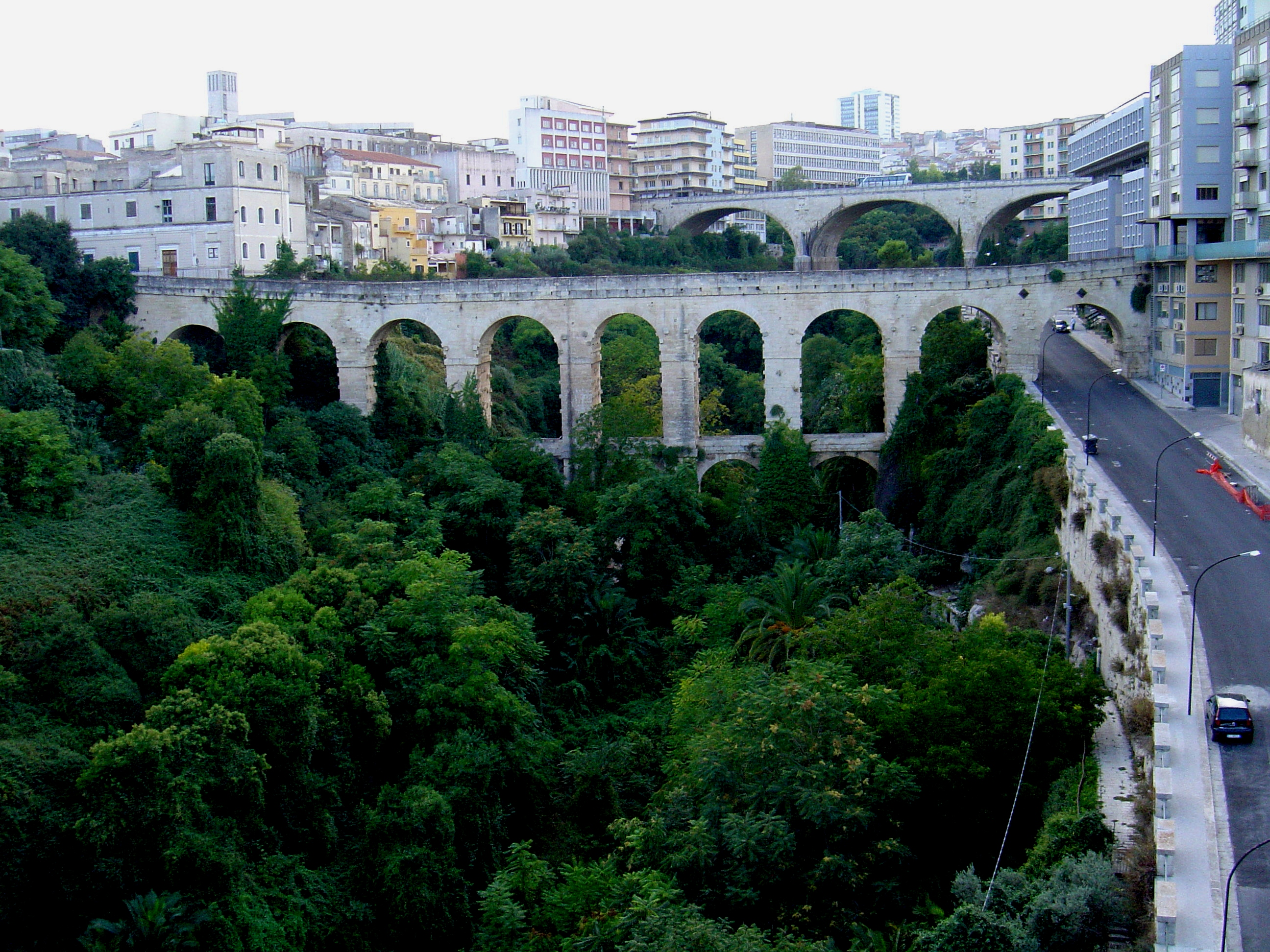 bridges, Ragusa